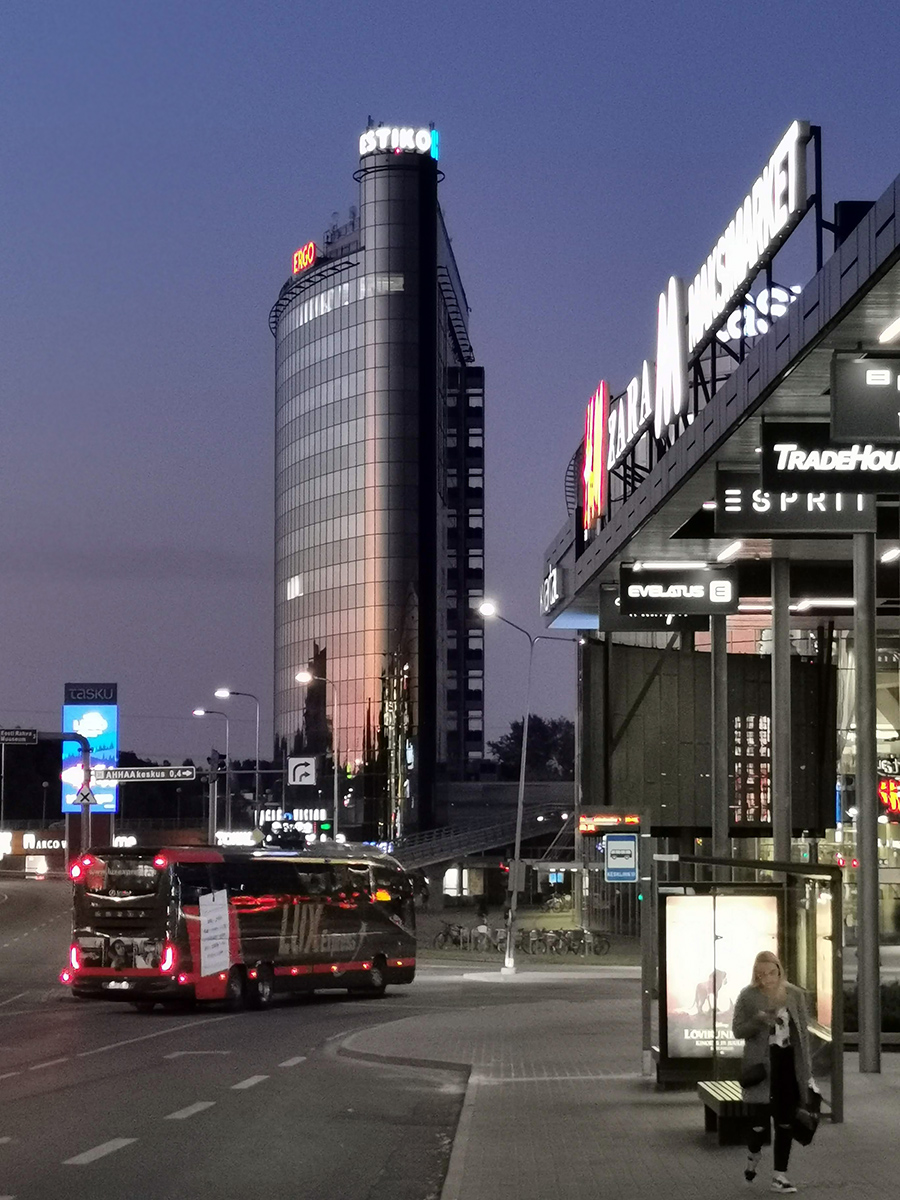 Emajõe Ärikeskus suvel 2019